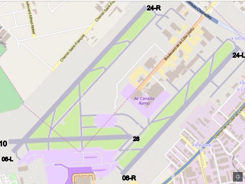 La carte des pistes principales à YUL.